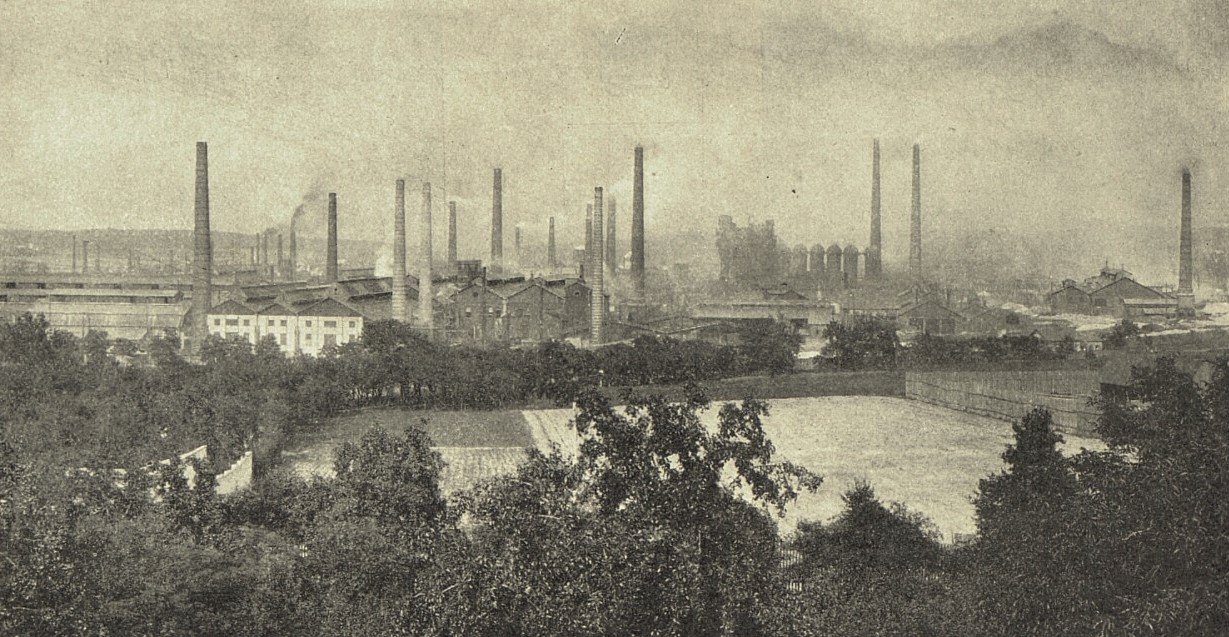 Kladenské hutě, 1908